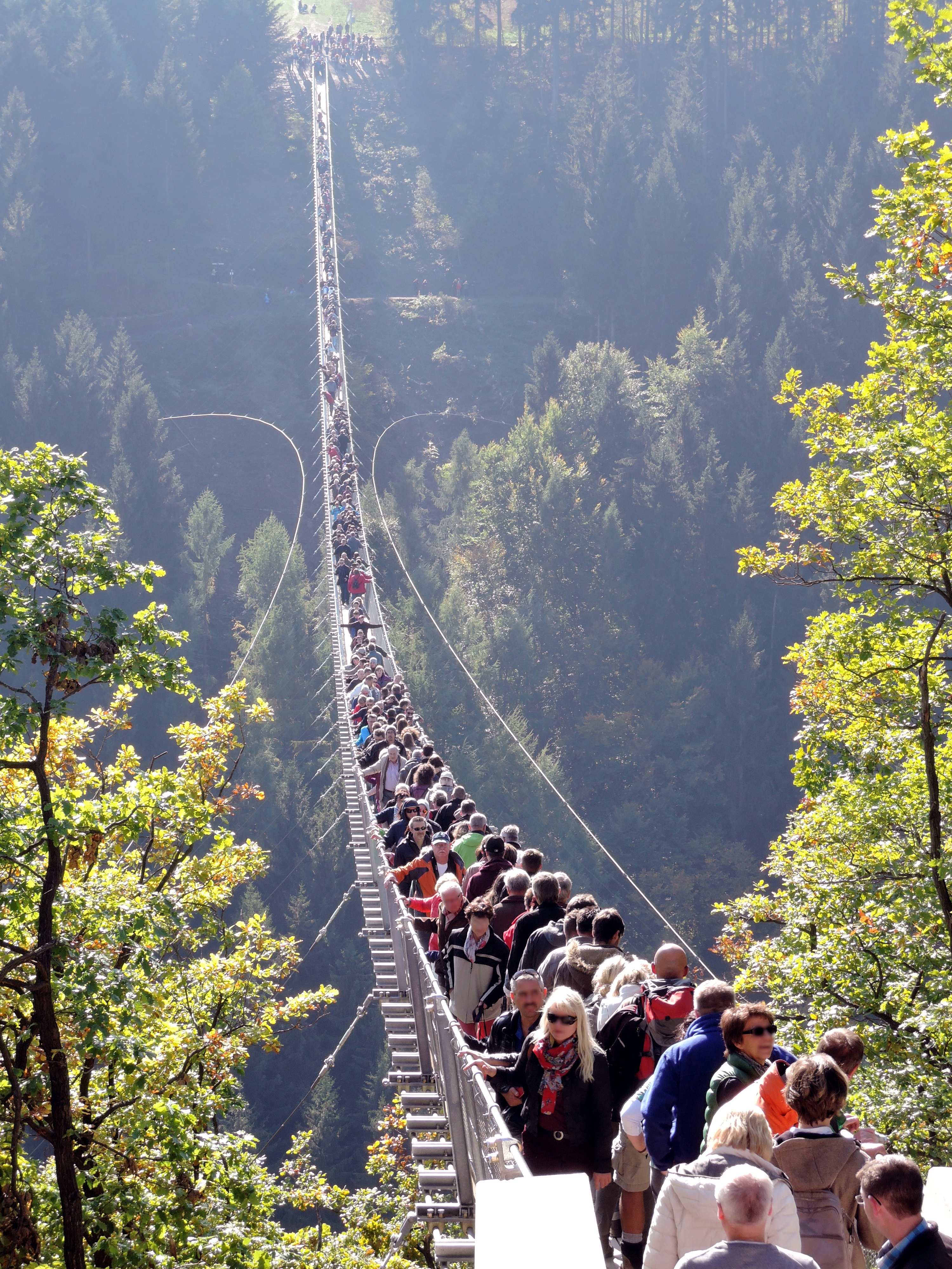 Hängeseilbrücke Geierlay am 11.10.2015, einem sonnigen Sonntag Mittag. Aufnahme von Mörsdorfer Seite aus.